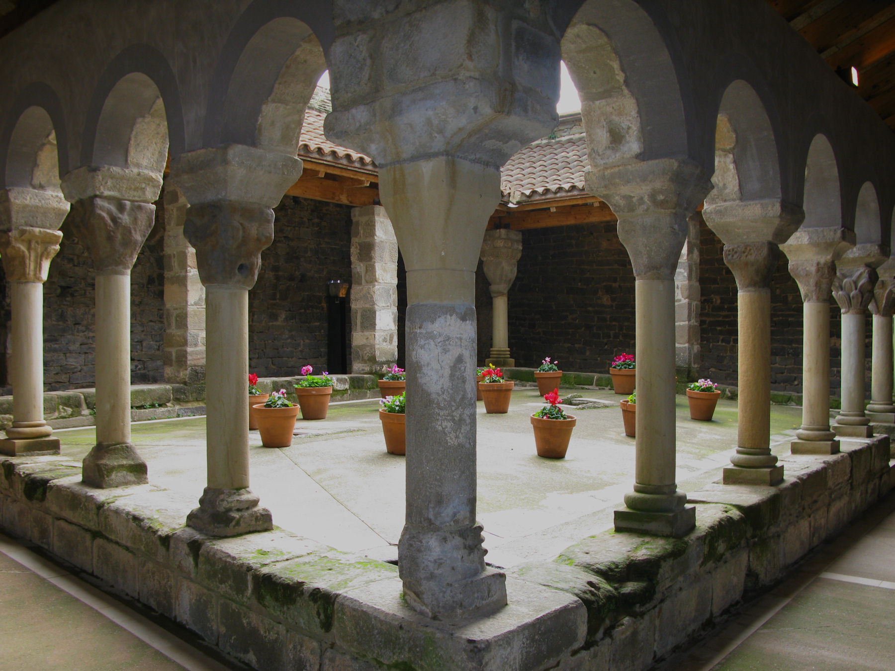 Sant Pere de Casserres - Les Masíes de Roda